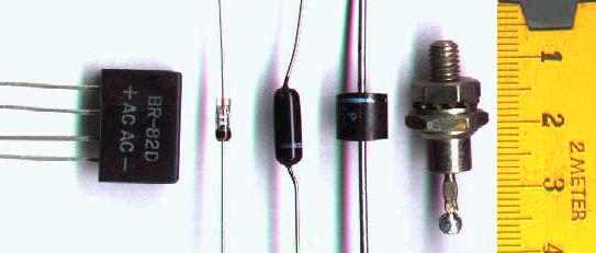 Auswahl von Dioden